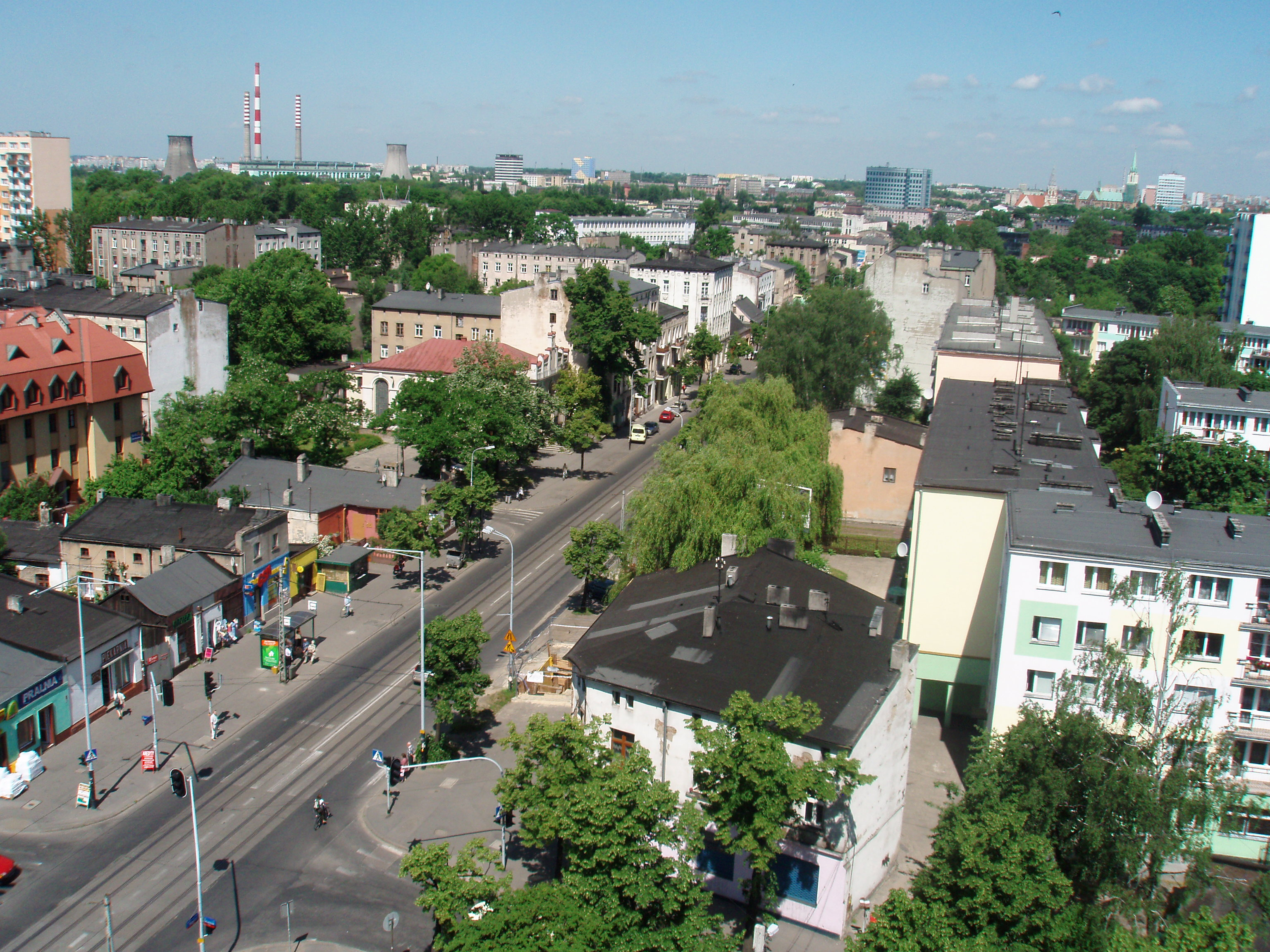 Widok w kierunku północnym na ulicę Rzgowska w Łodzi. Zdjęcie zrobione na wysokości ul. Leczniczej.